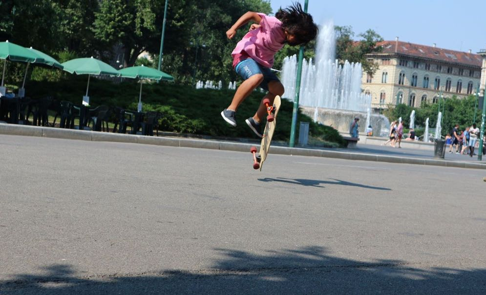 Skater durante un trick in Piazza Castello, Milano.